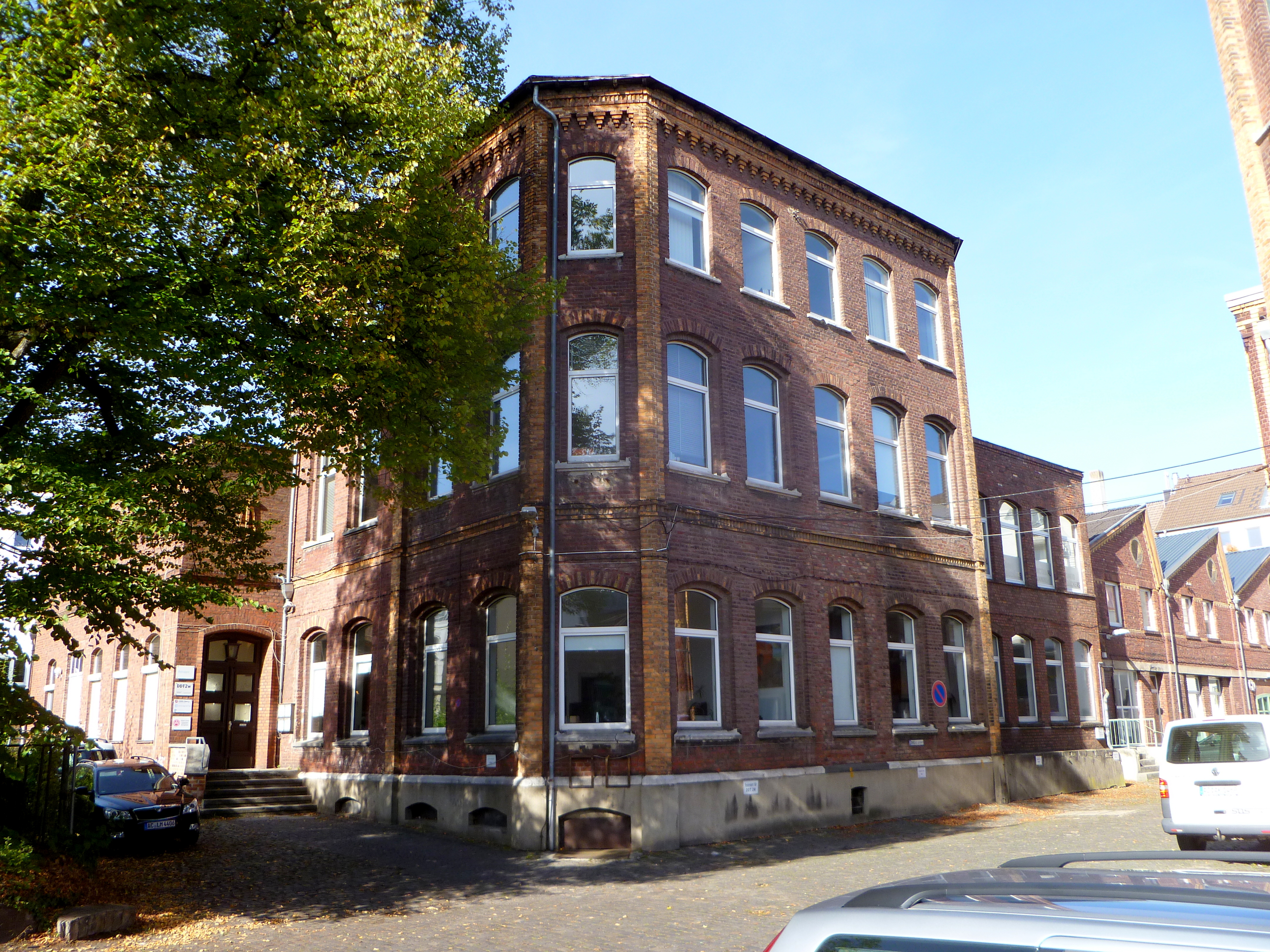 ehem. Tuchfabrik Aachen AG in der Charlottenstraße in Aachen